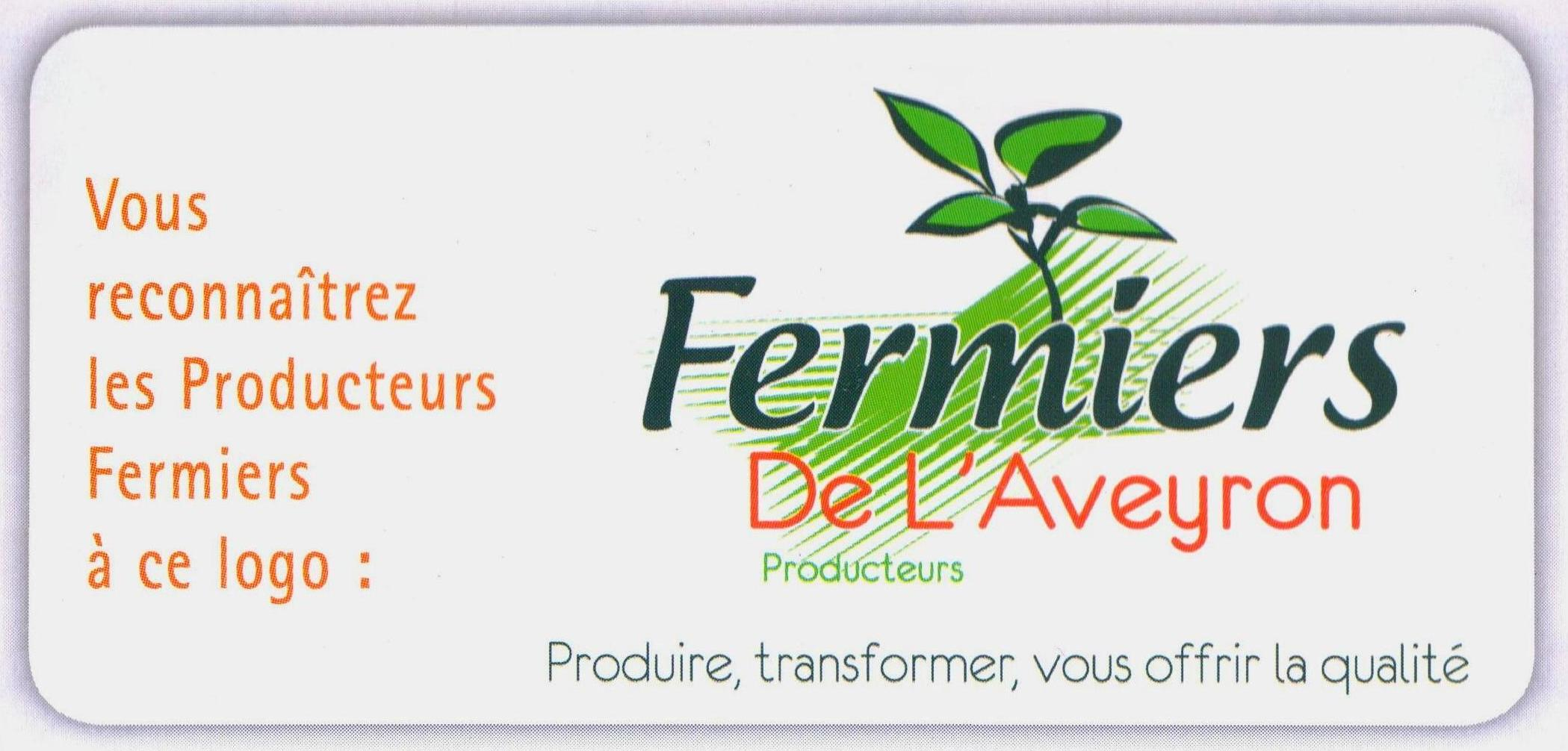 Logotype de l'association d'agriculteurs producteurs aveyronnais "Fermiers de l'Aveyron".